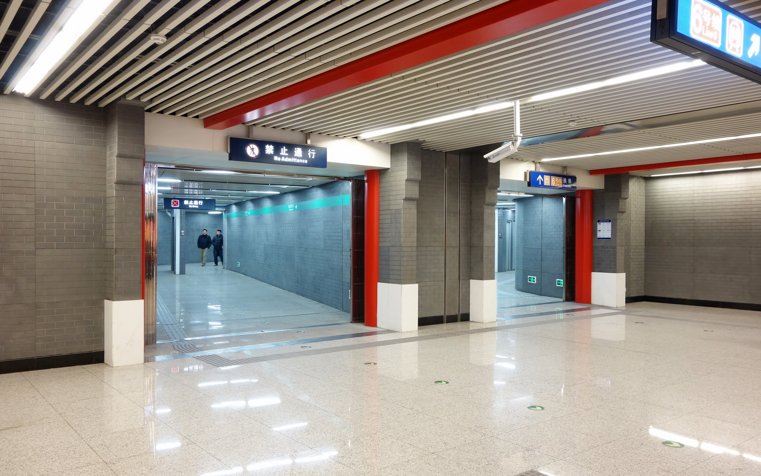 南锣鼓巷站8号线站台通往6号线站台的通道